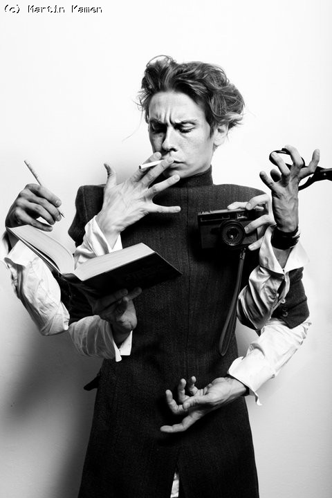 Martin Kámen Jean Coteau Tribute